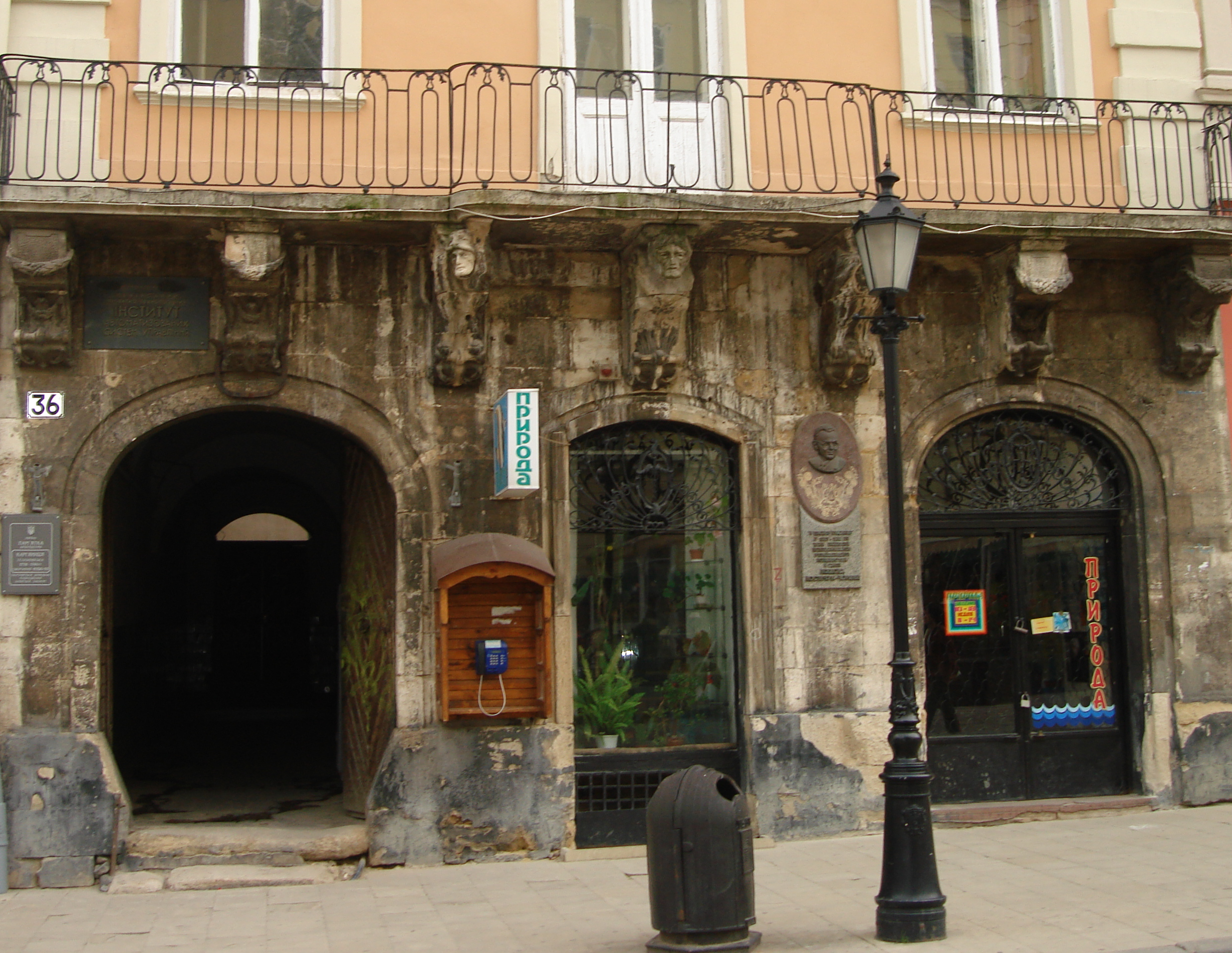 Lwów : Polish ; Lviv ; Львов - Rynek 36 - Kamienica Gielazynowska (XVI w., przebudowana w latach 1778-81 wg projektu Piotra Guibaut i ozdobiona przez niego ciekawymi konsolami balkonowymi w postaci lwów z ludzkimi głowami. W latach 1784-85 mieszkał w niej książę Józef Poniatowski.